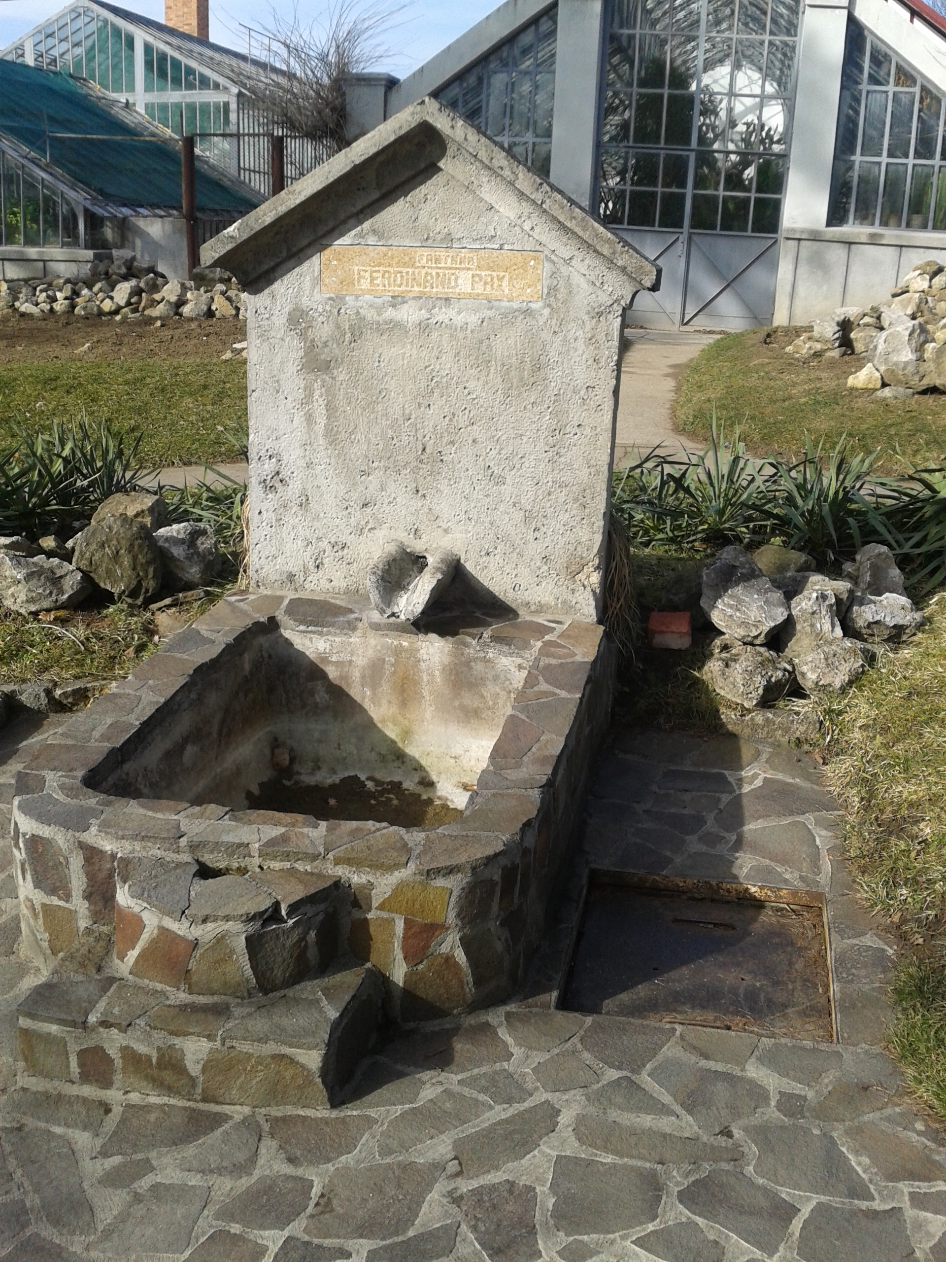 Fântâna Ferdinand Pax din Grădina Botanică din Cluj Napoca